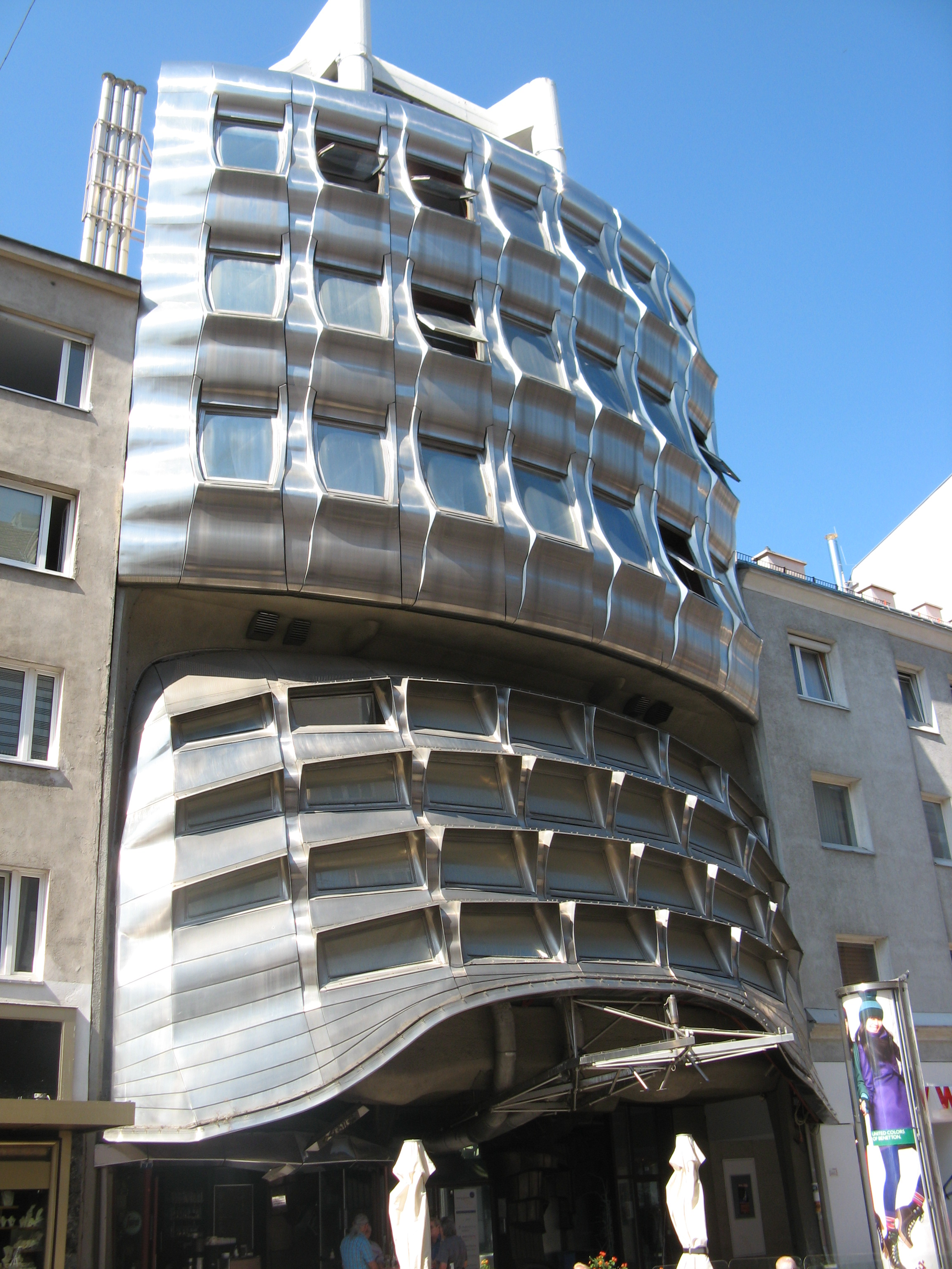 Ehemalige Zenrtralsparkassa (1975-79) von Günther Domenig, Favoritenstraße 118, Wien-Favoriten